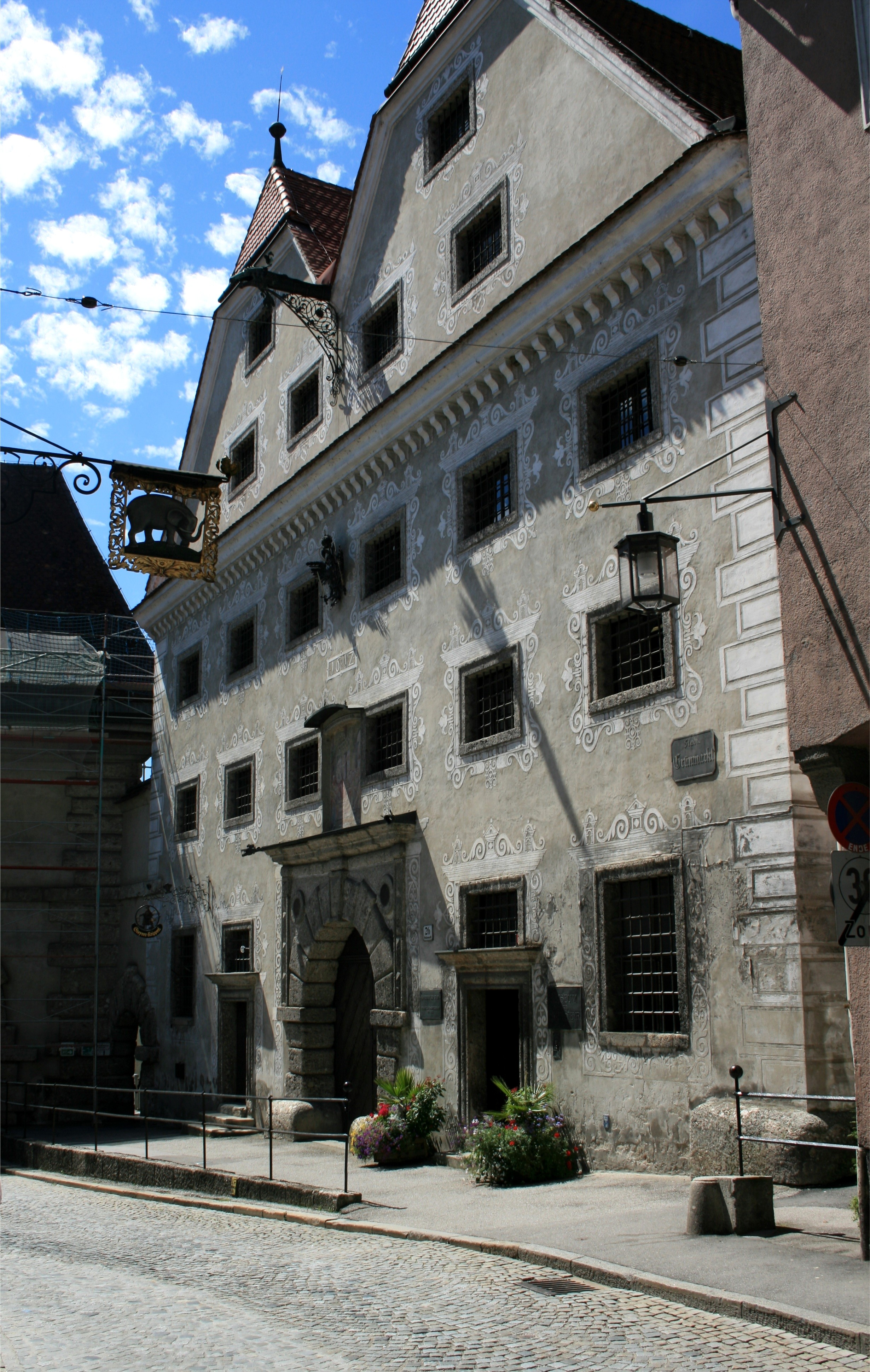 Der Innerberger Stadel in Steyr, Grünmarkt 26. Der Renaissancebau ist ein ehemaliges Speichergebäude der Innerberger Hauptgewerkschaft. Heute sind darin das Museum der Stadt Steyr und das Steyrer Kripperl untergebracht